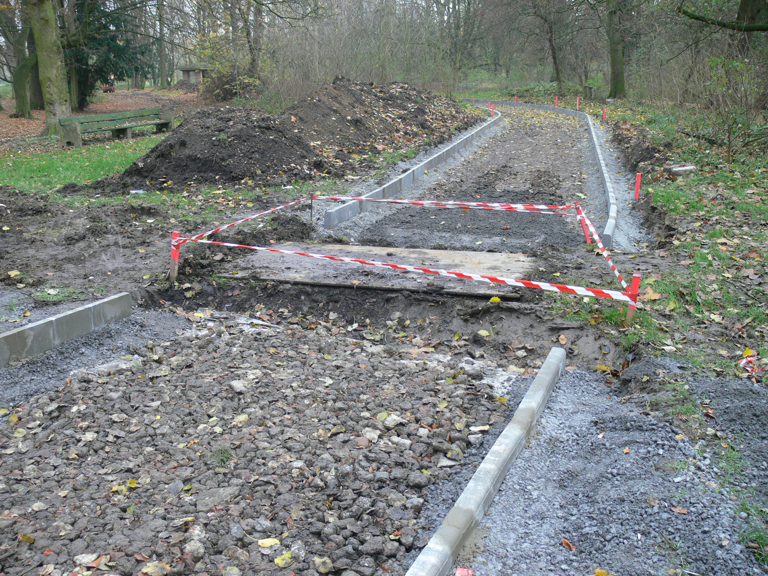 Écoducs dit « lombriducs », destinés à permettre aux vers de terre et à d'autres invertébrés ou micromammifères de traverser ce chemin de promenade (Parc urbain, Lille, Nord de la France). La terre qui est dans ce passage en forme de U renversé est la terre d'origine. Elle ne sera pas été déplacée ni tassée durant le chantier. Ce passage est destinée à diminuer la contribution du chemin à la fragmentation écologique du milieu.